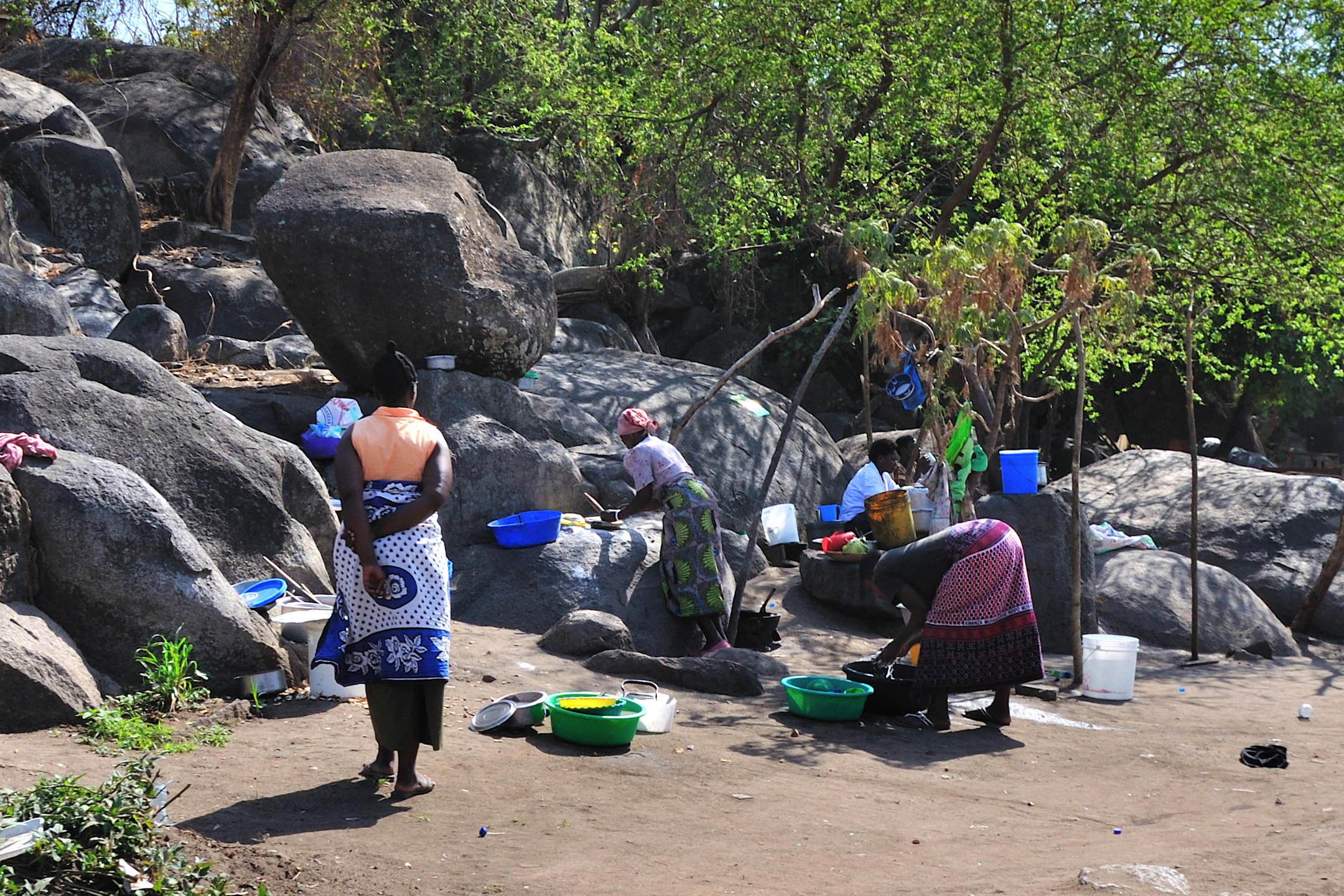 Tanzania, views in Mwanza